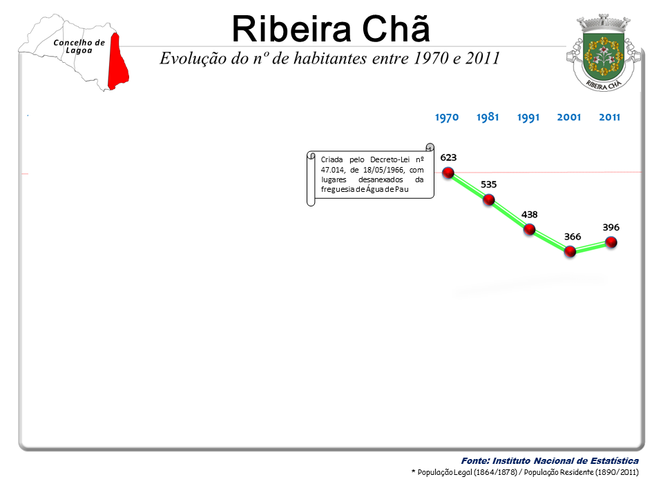 População